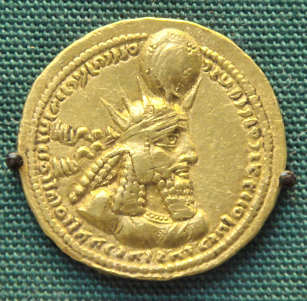 Varahran I